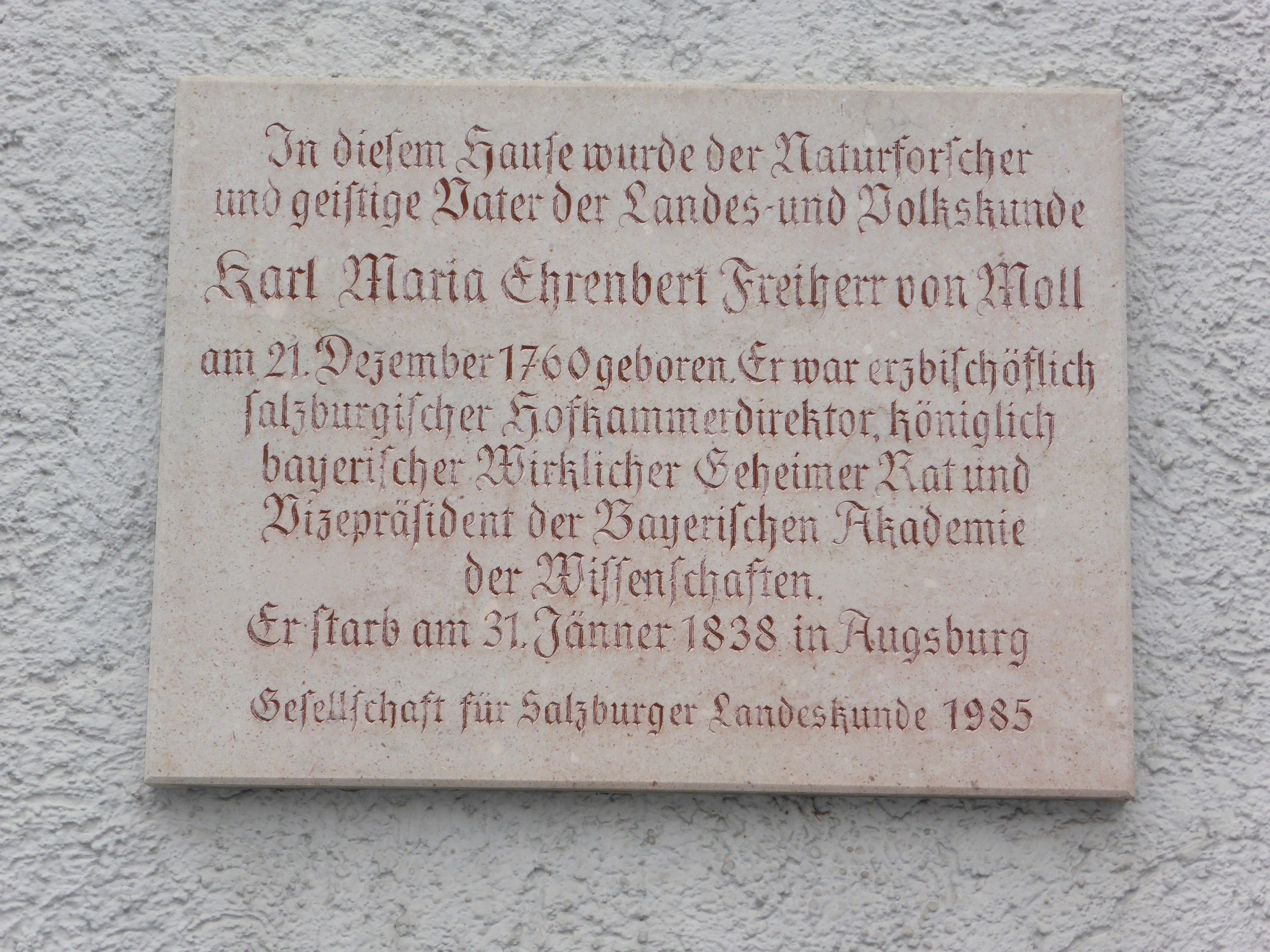 Bezirksgericht (ehem. Pfleggericht)